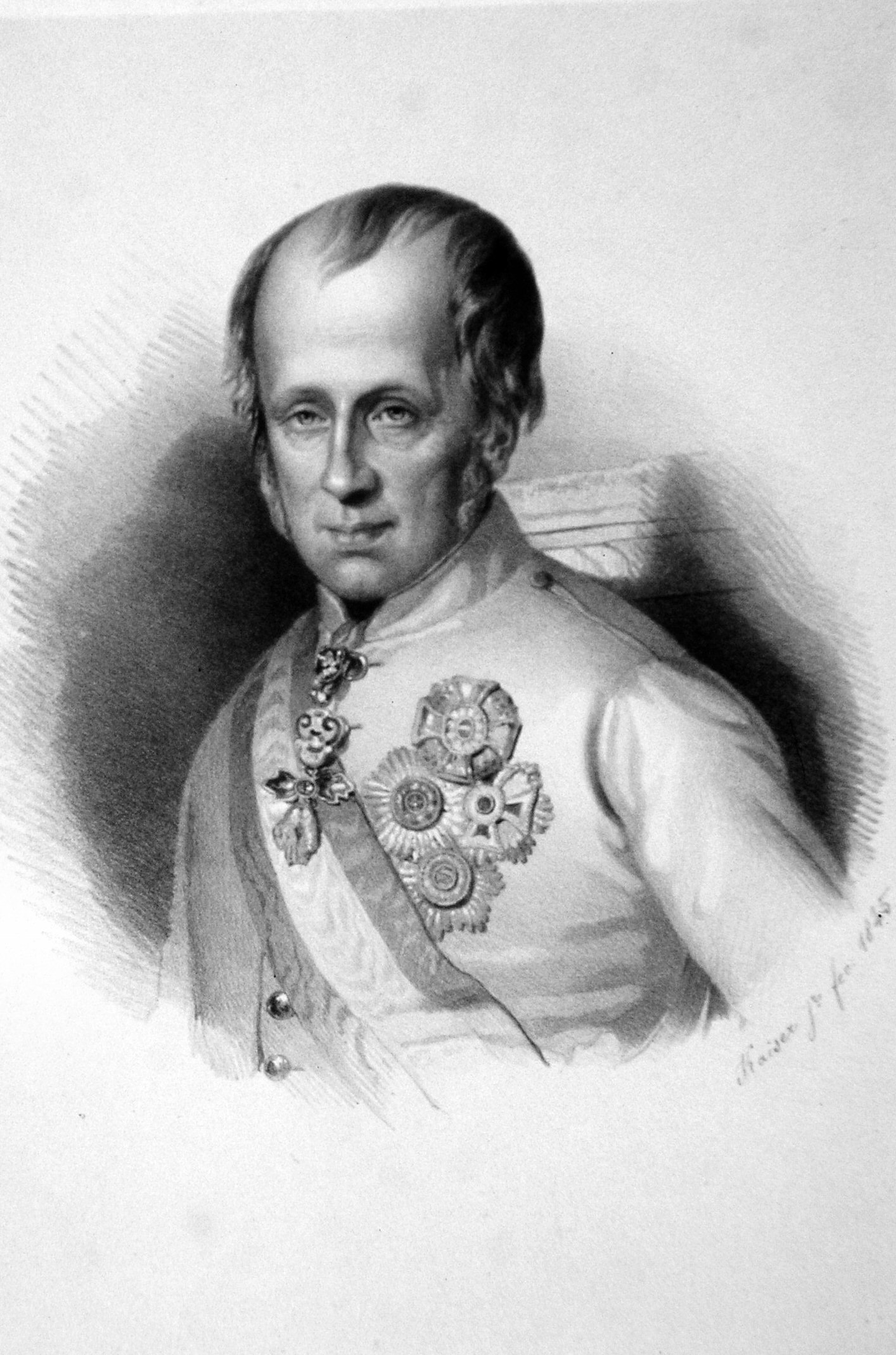 Ferdinand I. von Österreich. (1793-1875) Kaiser von Österreich, König von Ungarn etc. Lithographie von Eduard Kaiser.